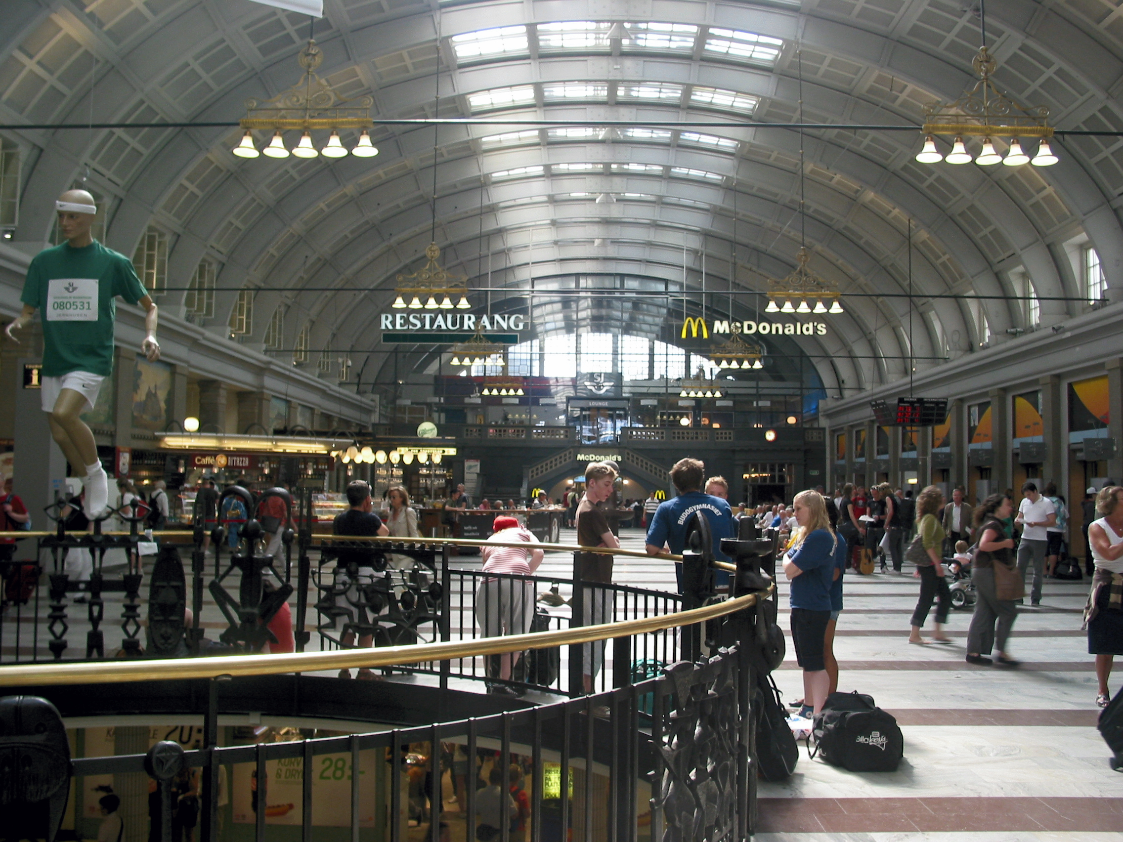 스톡홀름 중앙역. 아주 자주는 아니지만 여러 번 가보다보니 이제 이런 걸 봐도 그냥 그런가보다...-_-;; 왼쪽에 2008년 5월 31일 표어가 붙어있는 마네킹은 오늘 있는 스톡홀름 마라톤 대회를 홍보하기 위한 것인 듯. 참고로 저 뻥 뚫린 곳 아래쪽을 보면 인조 잔디에 초록색 신발 한짝이 놓여져있다.